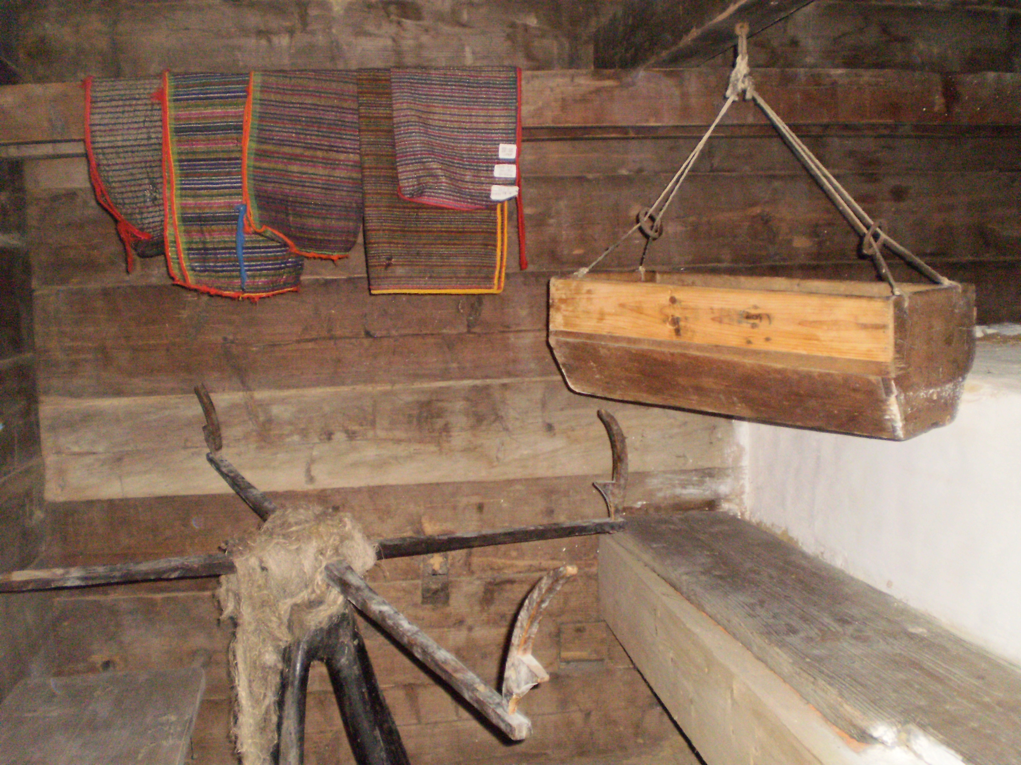 Гуцульська гражда, Крилос, ур. Прокаліїв Сад